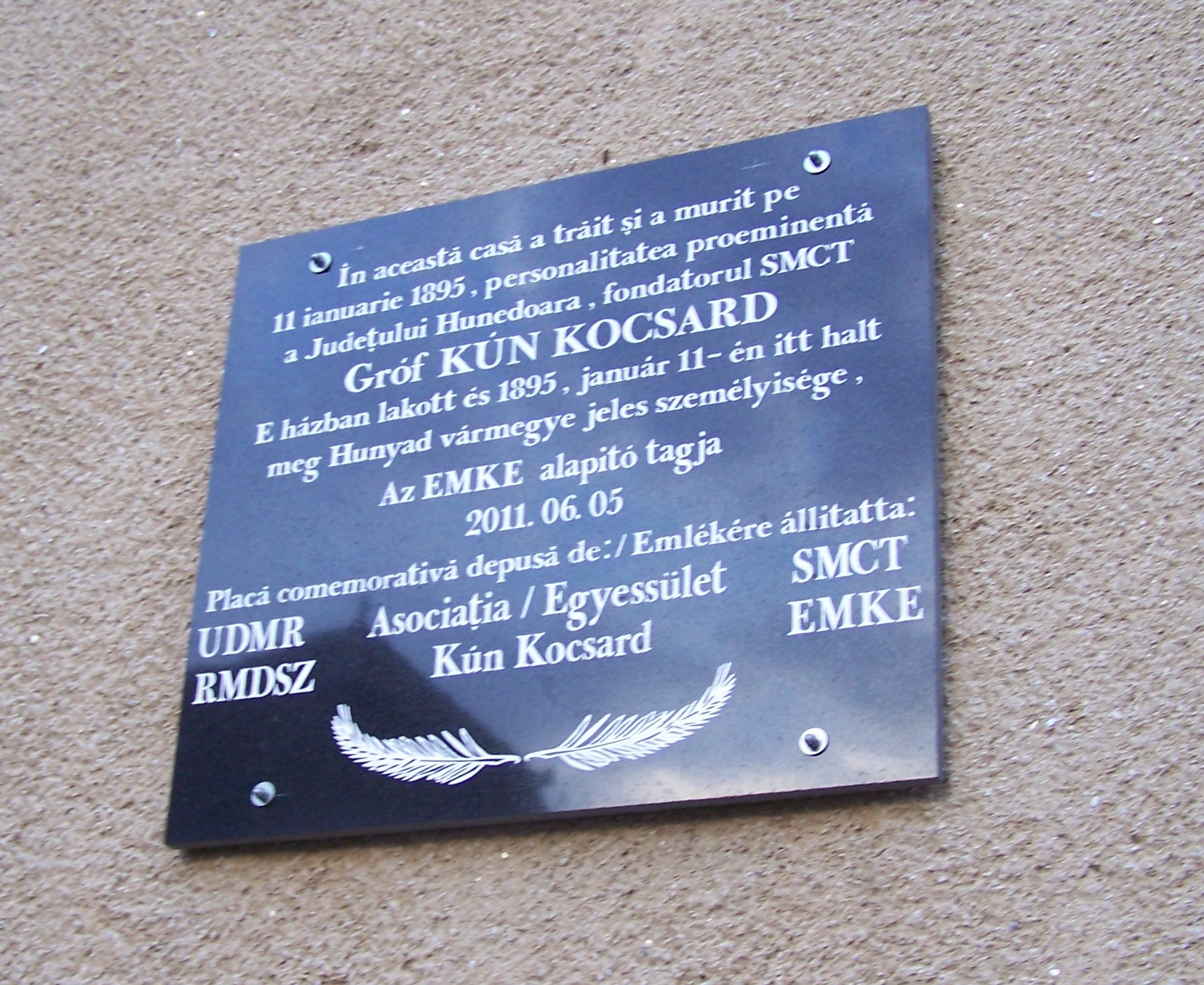 Placa memoriala de pe casa Kocsard Kun din Orastie.